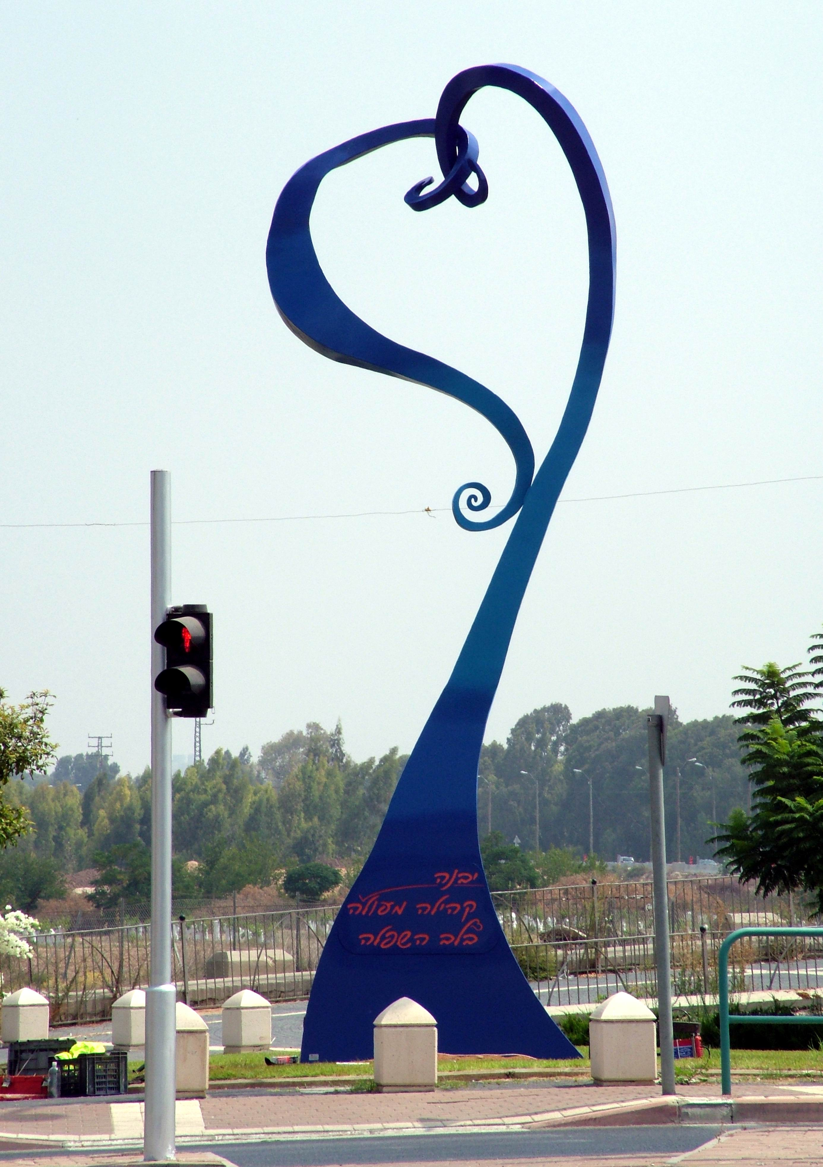 פסל: ישראל פרימו, עבודת ברזל בנפחים. 500 ס"מ